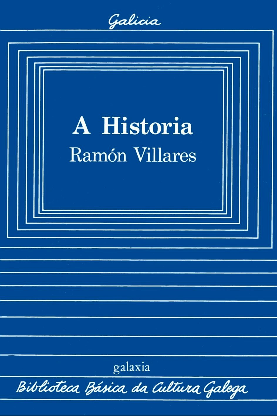 Biblioteca Básica da Cultura Galega, 02, A Historial, Ramón Villares.jpg